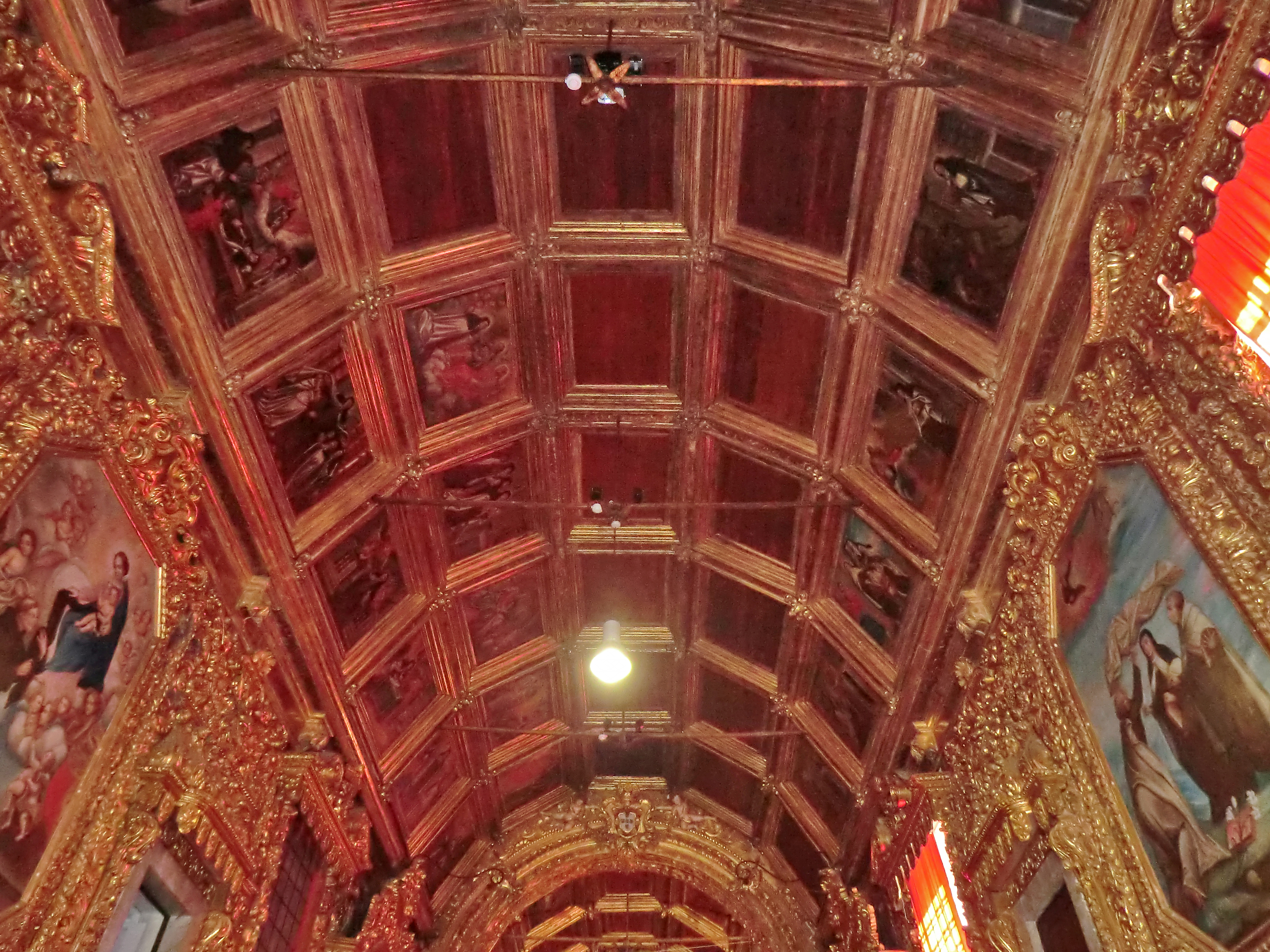 Igreja das Carmelitas ou Igreja de São João Evangelista This file was uploaded for Wiki Loves Monuments in Portugal with the unique identifier 71150.